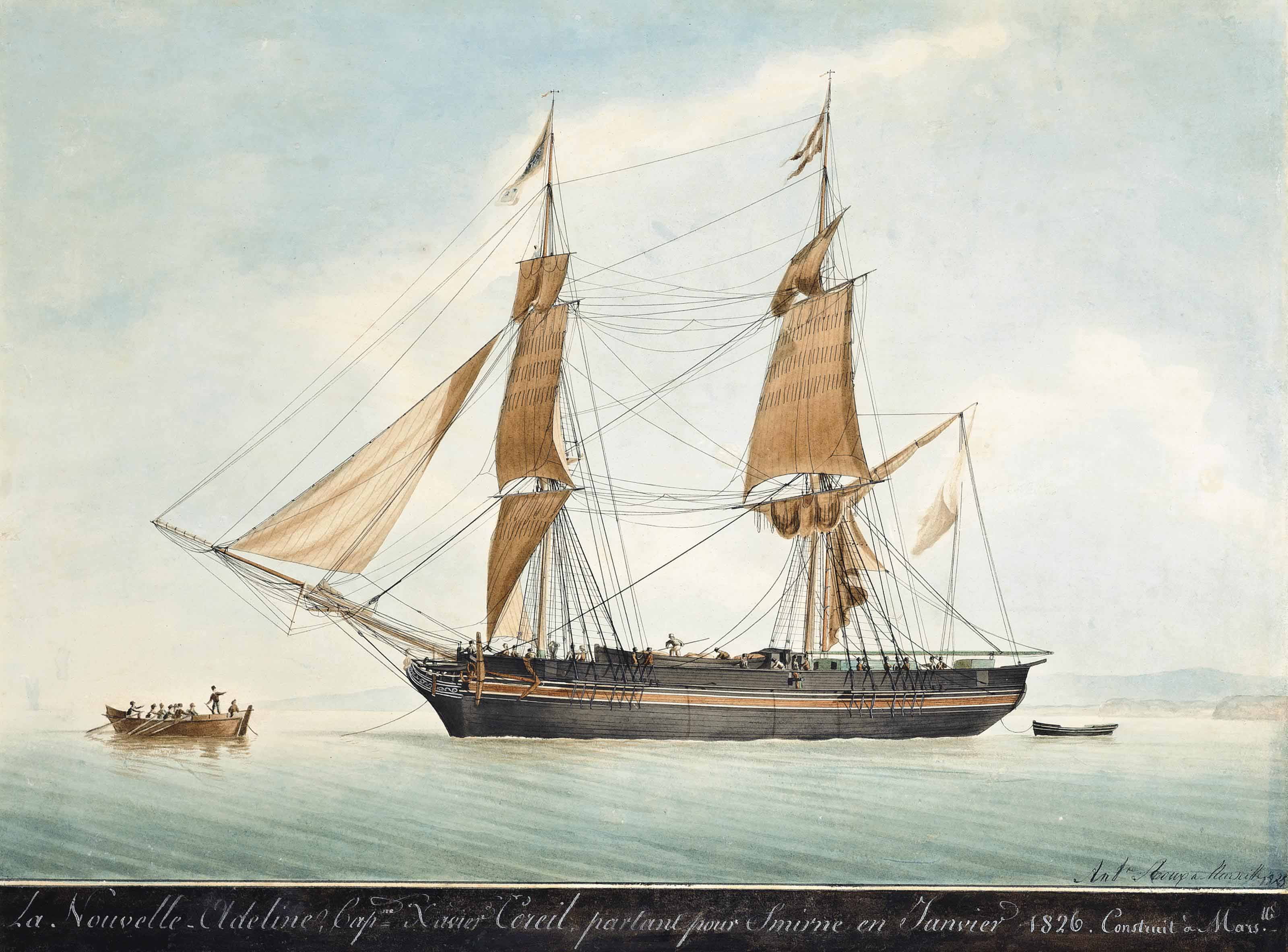 The French brig Adeline preparing to set sail to Smyrna, Greece, on her maiden voyage from Marseille